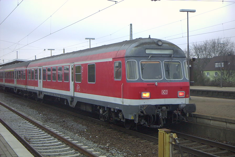 DB-Steuerwagen am Ende eines Regional-Express in Richtung Rotenburg (Wümme) im Bahnhof von Nienburg/Weser.